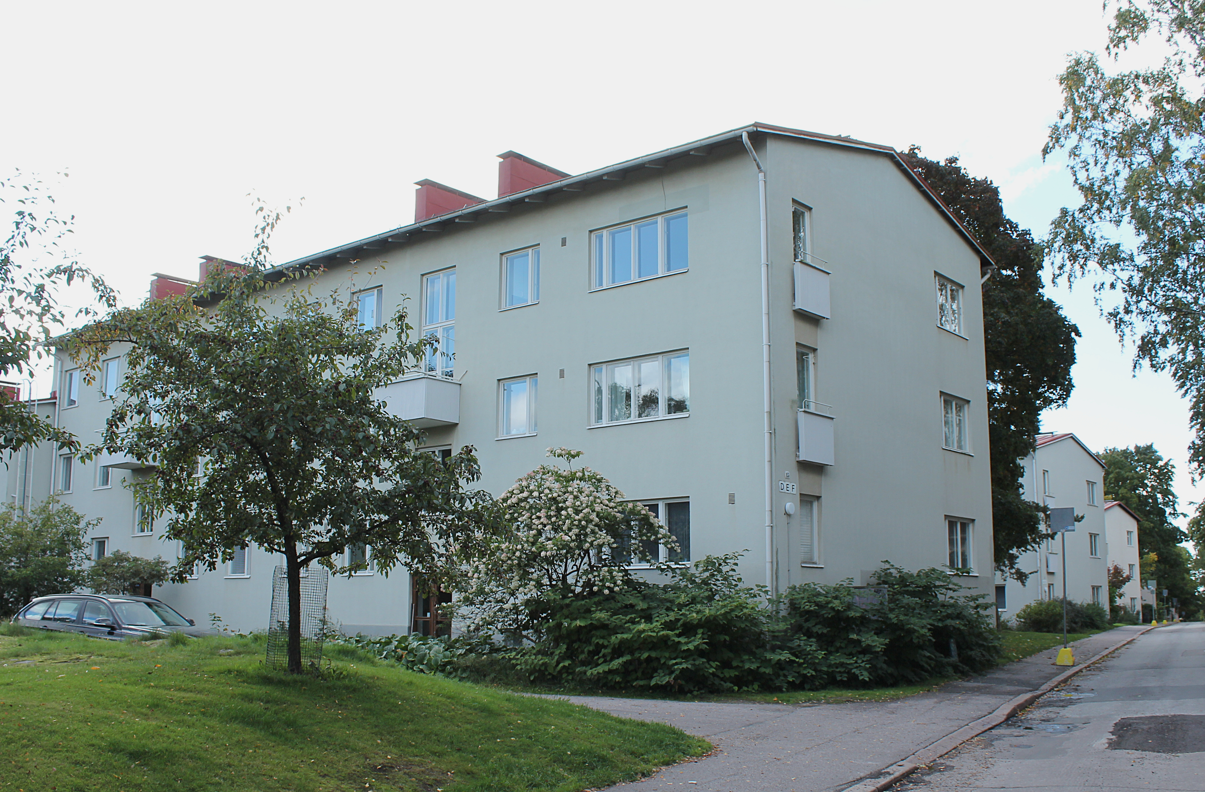 Olympiakylän rakennuksia Untamontiellä.